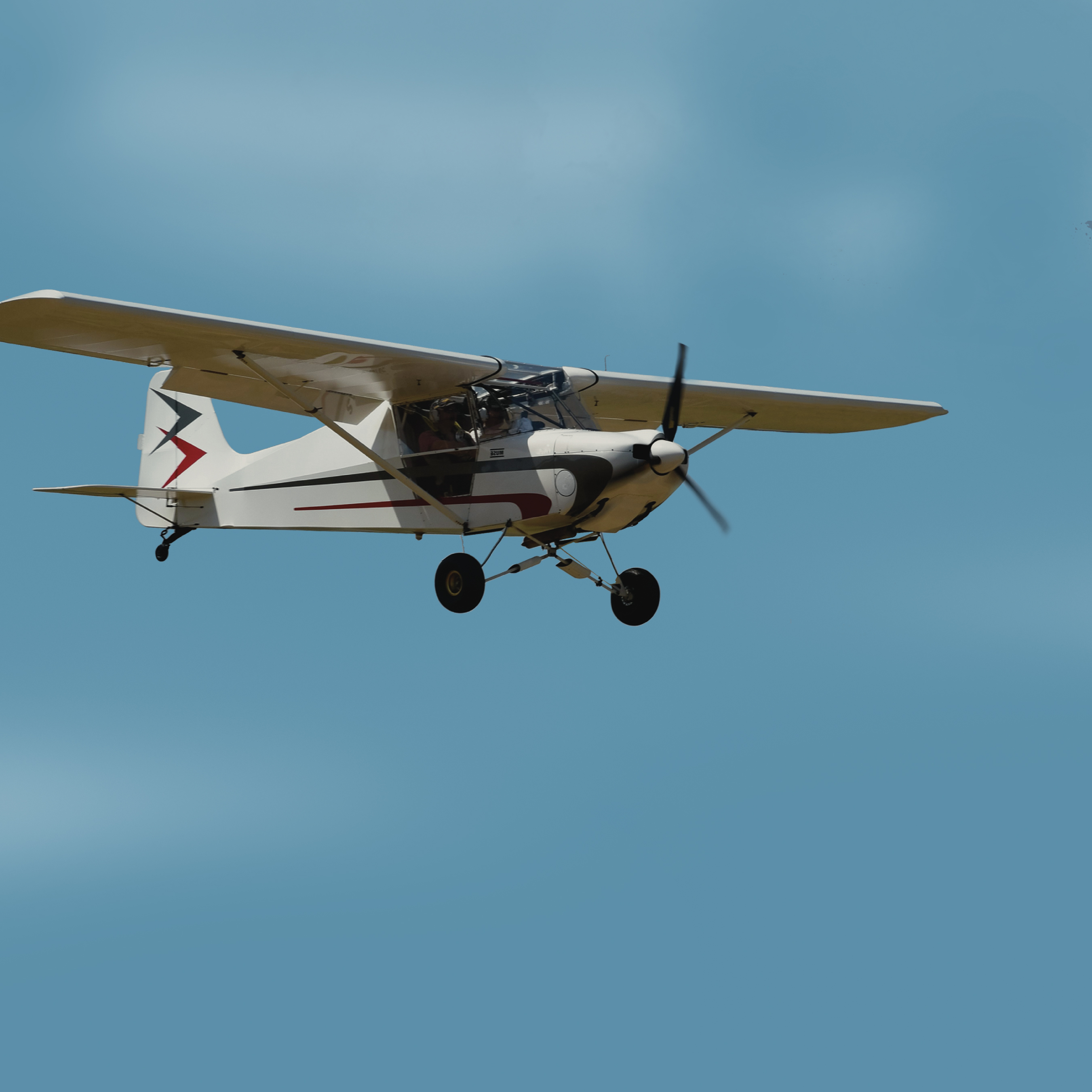 Multi-axes